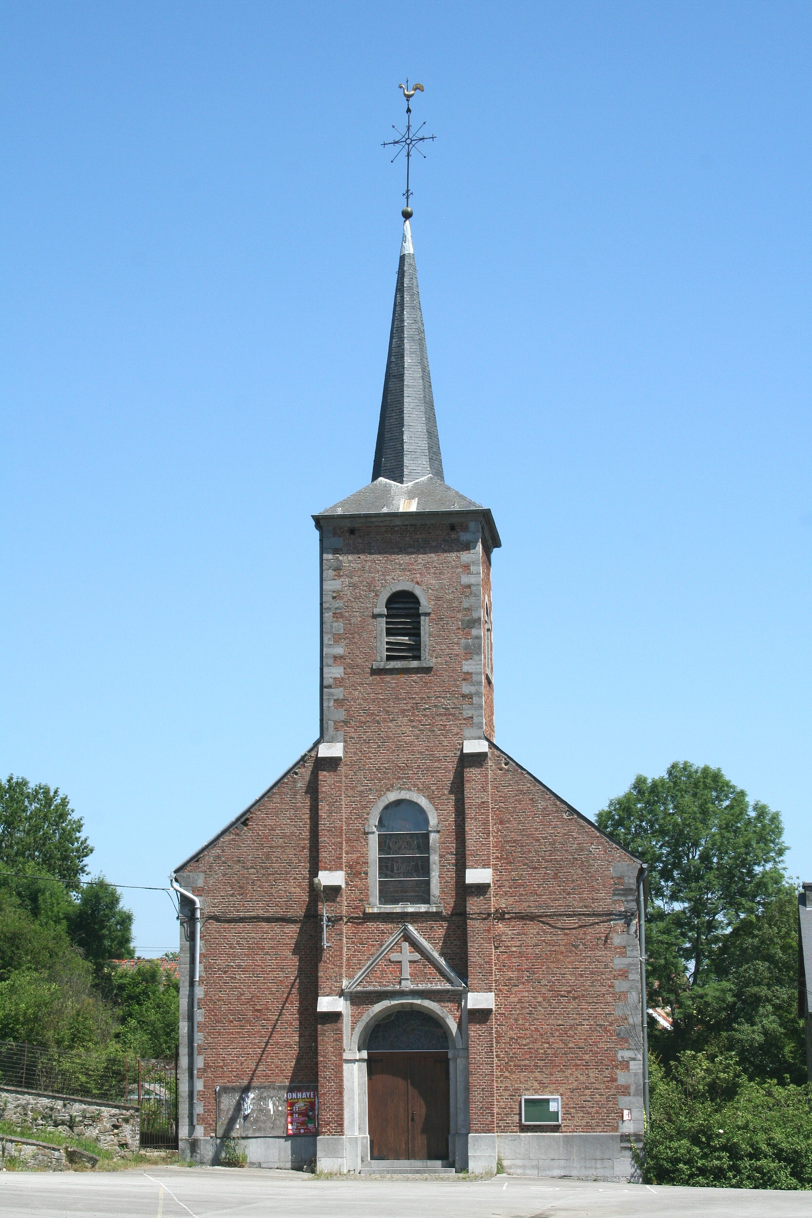 Hulsonniaux, l'église Saint-Barthélemy (1963-1864).